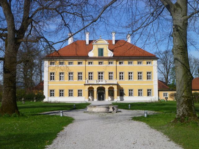 Frohnburg